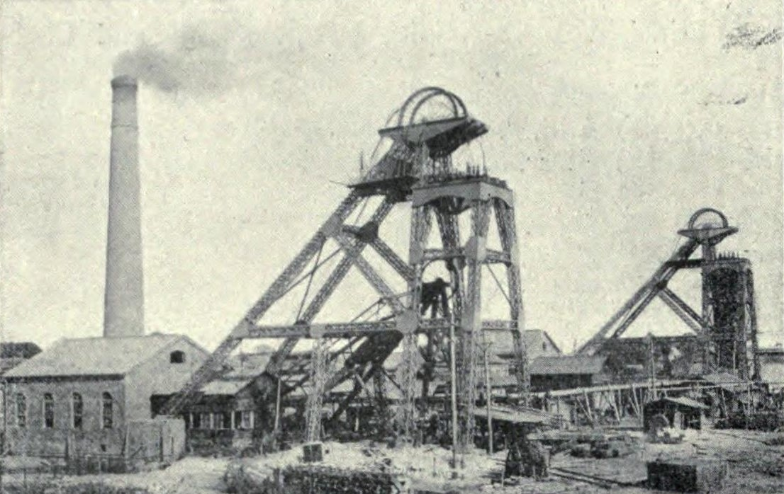 方城炭鉱 明治時代